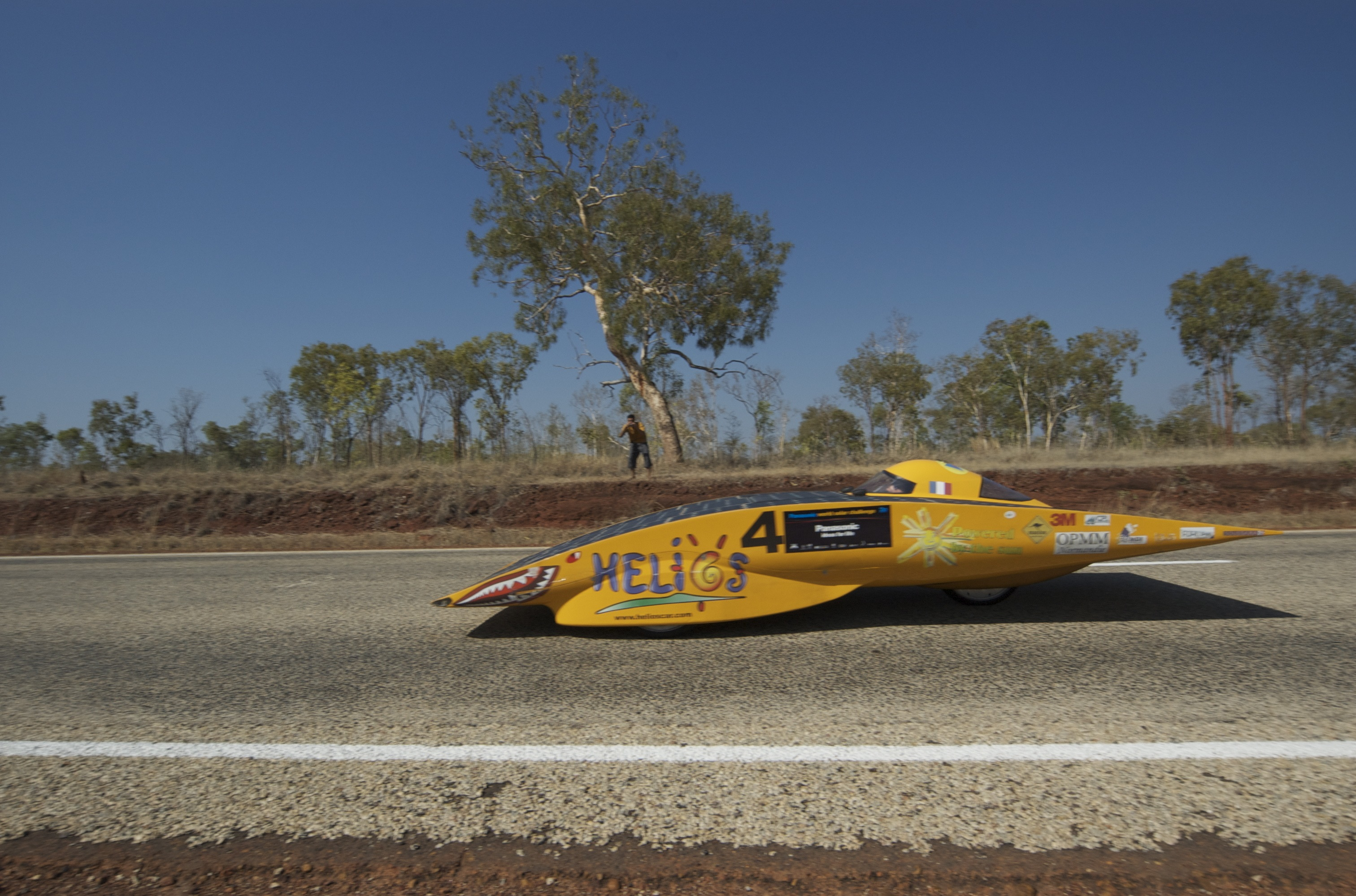 Hélios IV, la voiture solaire française en Australie lors du WSC 2007